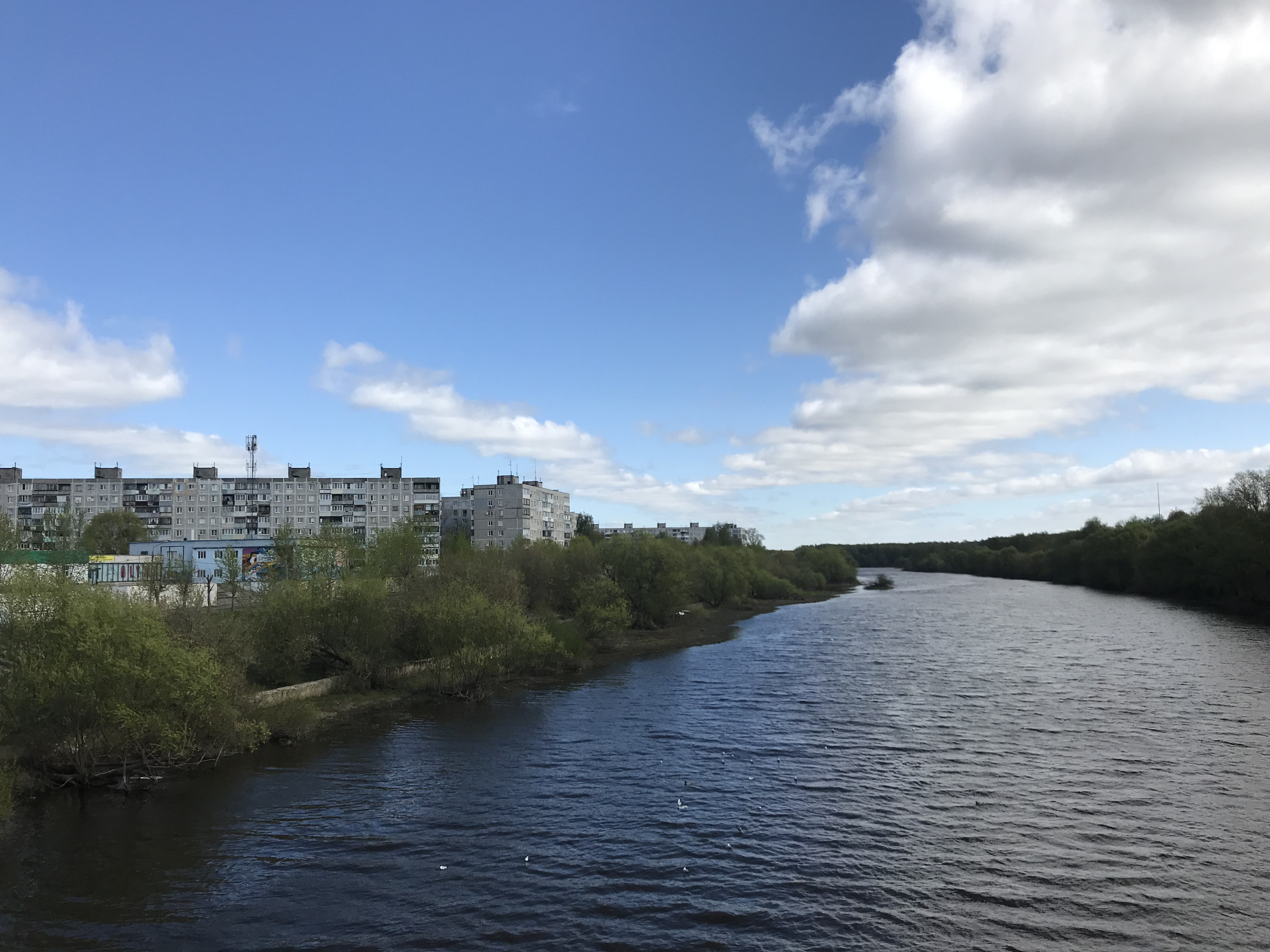 Река течёт в городе Орехово-Зуево